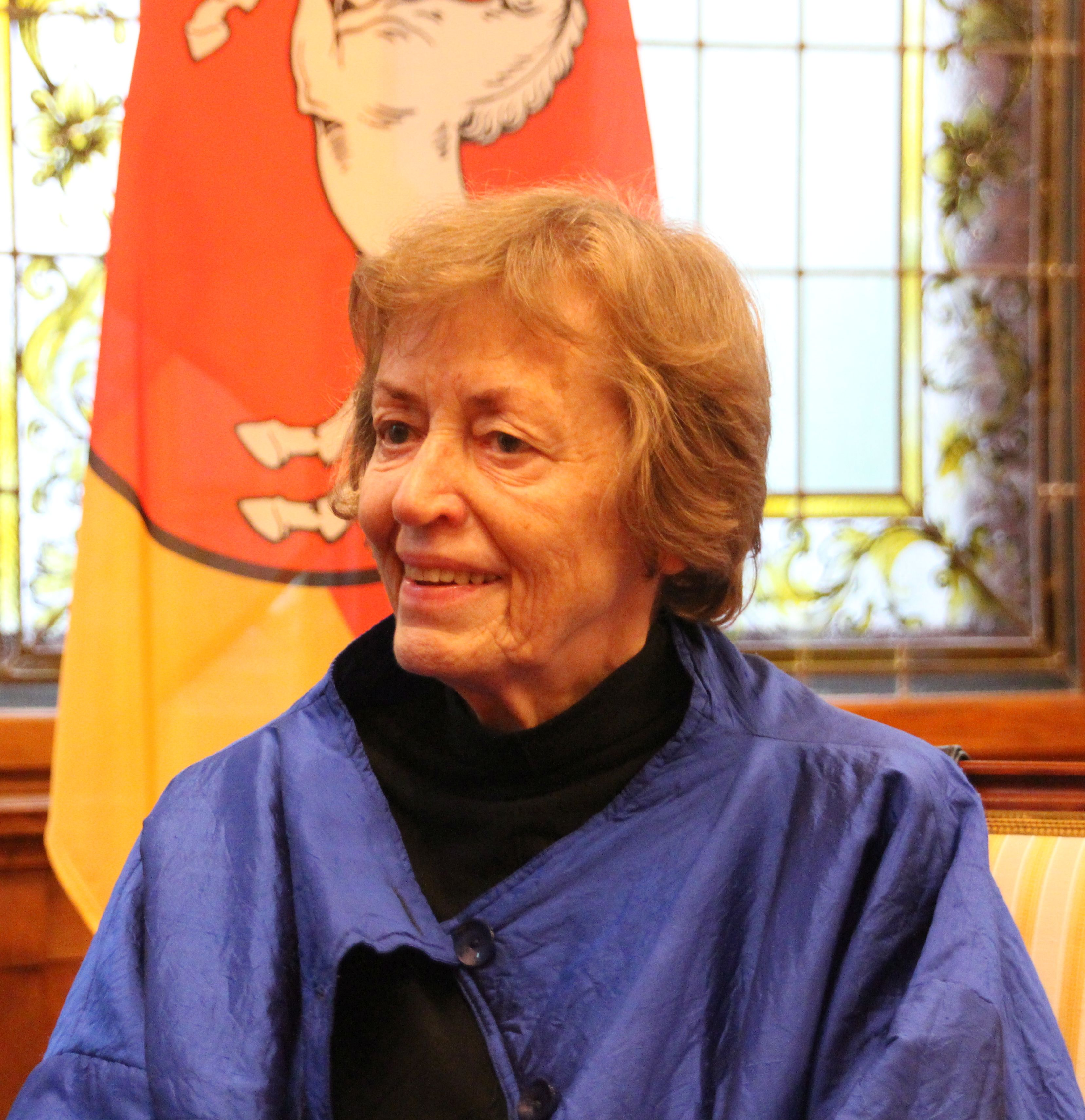 Der Niedersächsische Ministerpräsident, Stephan Weil, verlieh Klaus Wettig im Jahr 2017 das Verdienstkreuz 1. Klasse des Niedersächsischen Verdienstordens und händigte es ihm im Gästehaus der Niedersächsischen Landesregierung am 25. Oktober 2017 aus.Das Foto zeigt Inge Wettig-Danielmeier, die Ehefrau des Geehrten, während der Zeremonie.